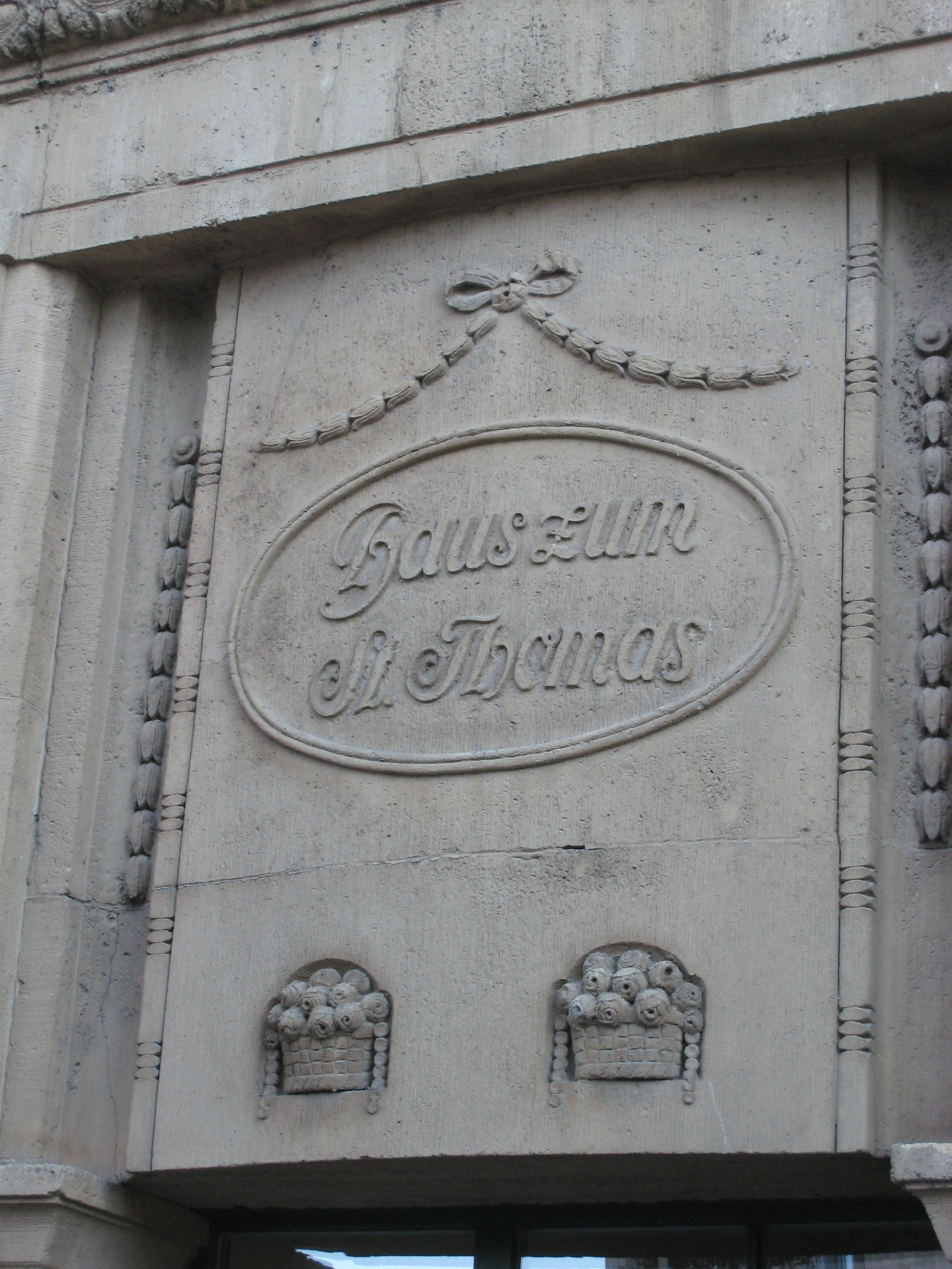 Inschrift am Standort der ehemaligen Thomaskirche in Erfurt, heute Wohnhaus Löberstraße 17